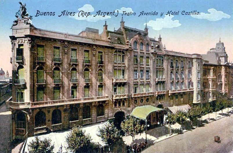 Edificio del Hotel Castilla, y a su derecha, el Teatro Avenida. Ambos sufrieron un incendio en 1979, y fueron reconstruidos y reinaugurado en 1994. Avenida de Mayo, esquina Santiago del Estero.